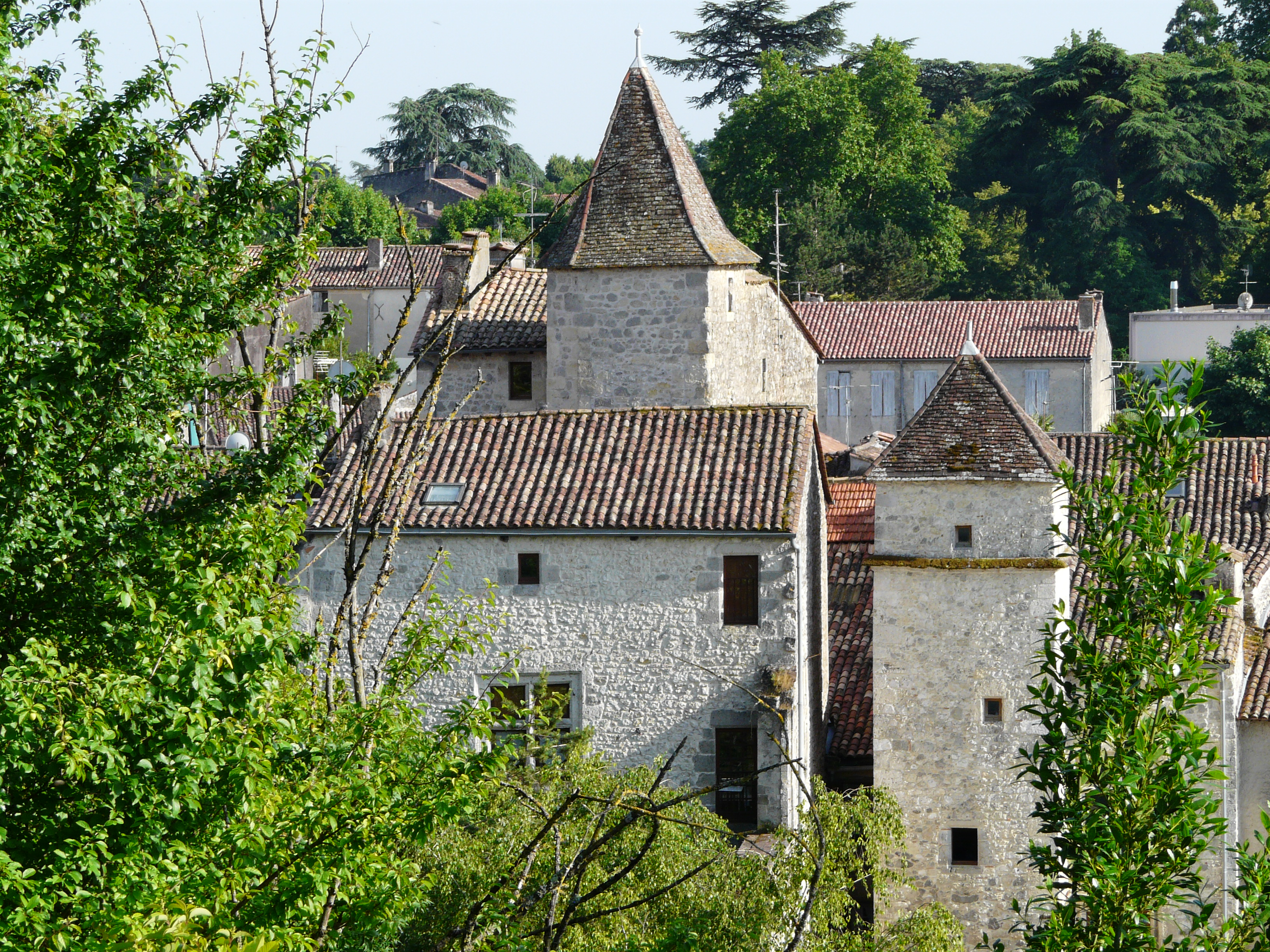 Le côté nord de la maison de Sully, Nérac, Lot-et-Garonne, France.